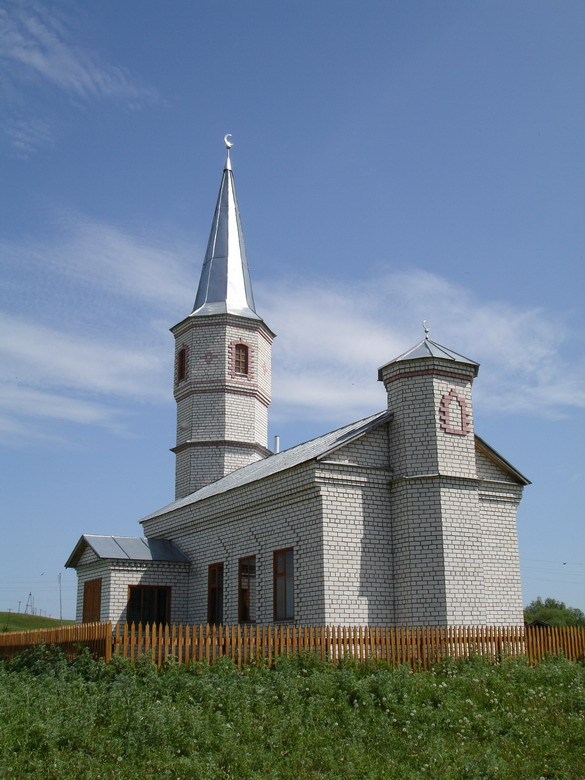 Новая мечеть в с. Азеево, Рязанская область, Россия